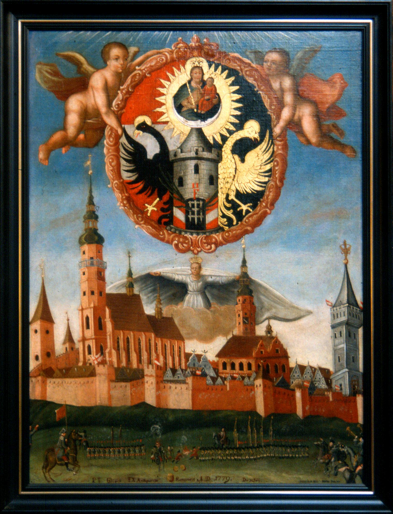 Gleiwitz - Mansfelder Soldaten belagern die Stadt. Gliwice - duńczycy hrabiego von Mansfeld oblegają miasto.